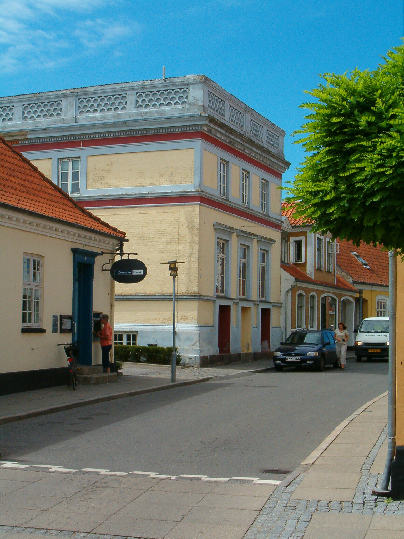 Villa Marina Made by: Erik Damskier 21:32, 13 July 2006 (UTC)